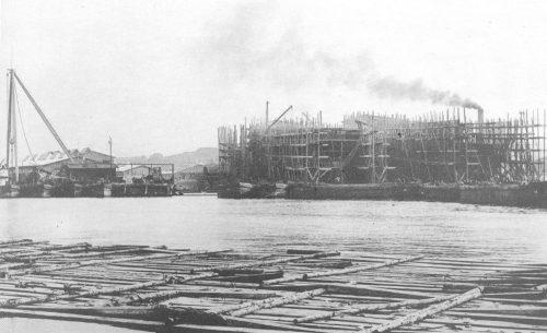 Stocznia Schichaua w Gdańsku.